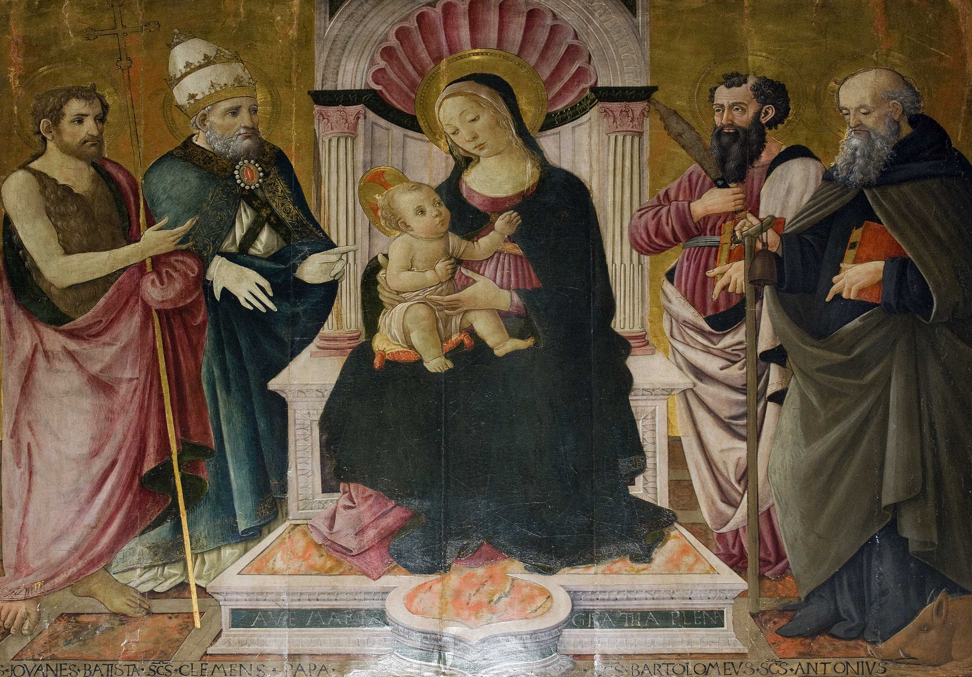 Madonna col Bambino , Maestro di San Miniato, pieve di santa maria assunta, stia